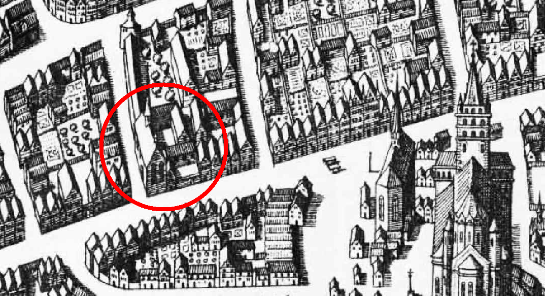 Lage des Klarissenklosters auf dem Stich von Braun und Hogenberg